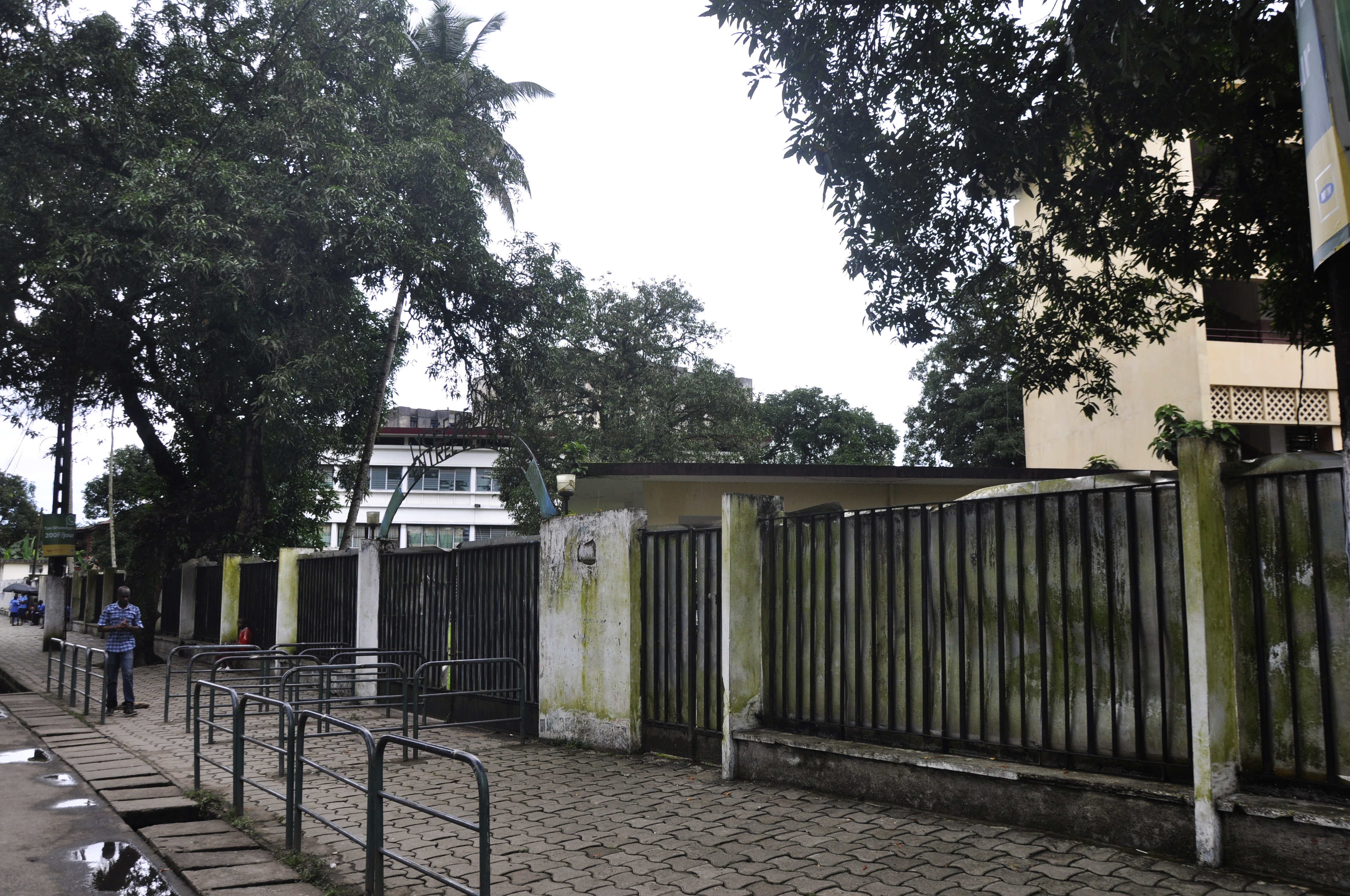 Lycée Joss